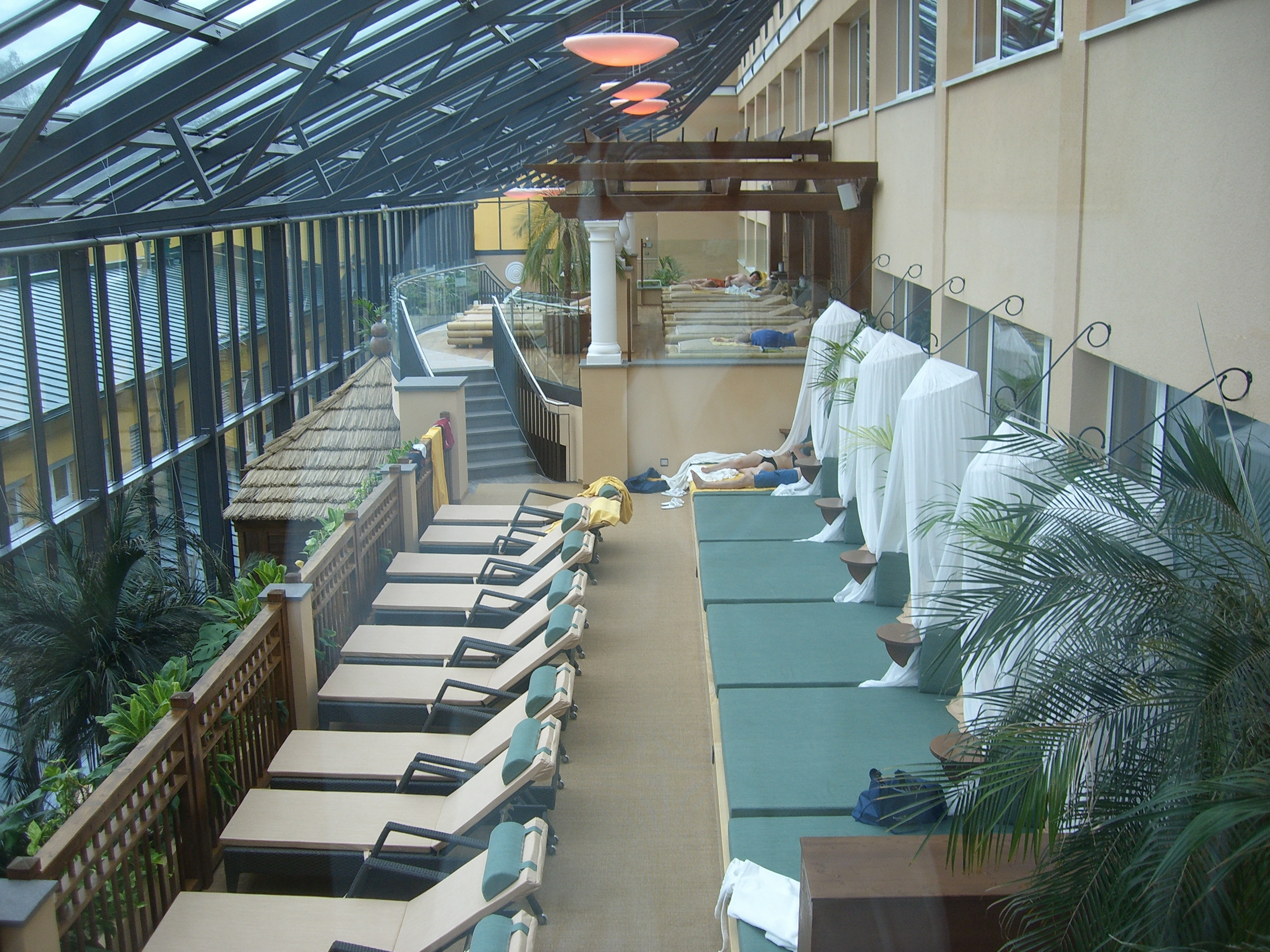 Relax-Bereich des Hotel Paradiso, Bad Schallerbach